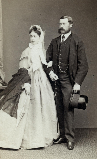 Bildnis (Johann von Harrach und Maria von Lobkowitz: ganze Figur stehend, halb links; mit seiner Gattin Marie, geborene Prinzessin Lobkowitz.